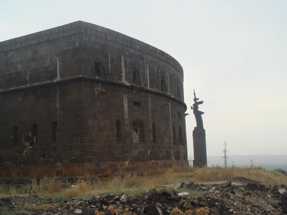 Черная крепость, Black Fortress 1/2 1/20